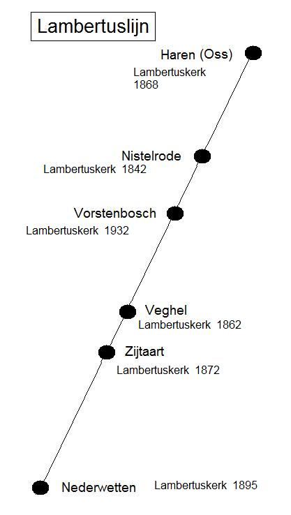 Lambertuslijn, rechte lijn met Lambertuskerken.